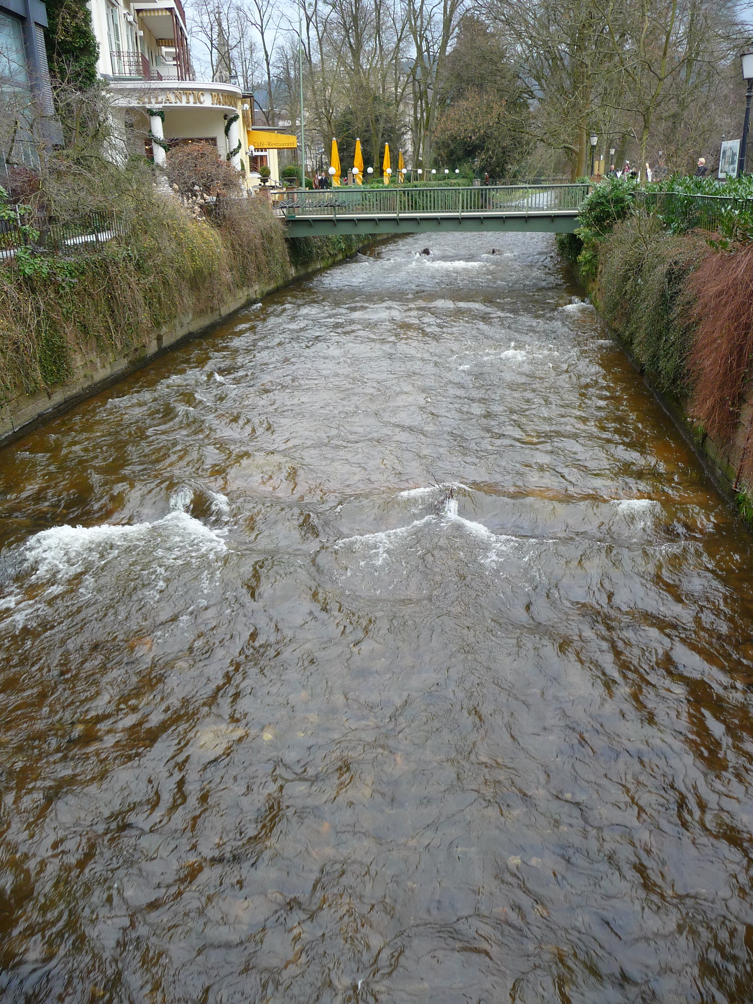 Blick auf die Oos von der Reinhard-Fieser-Brücke in Baden-Baden (Baden-Württemberg, Deutschland)